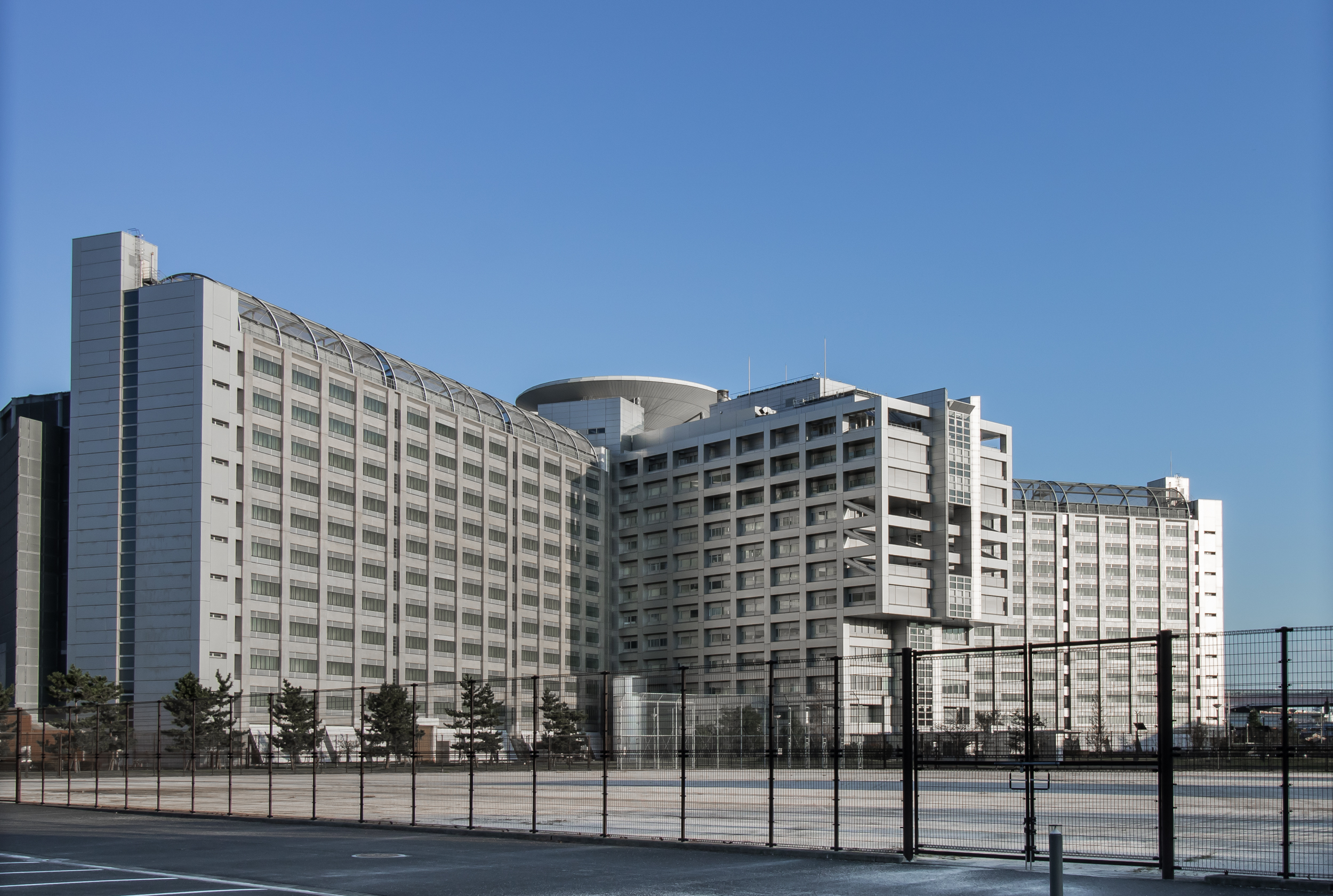 東京拘置所（東京都葛飾区小菅）。